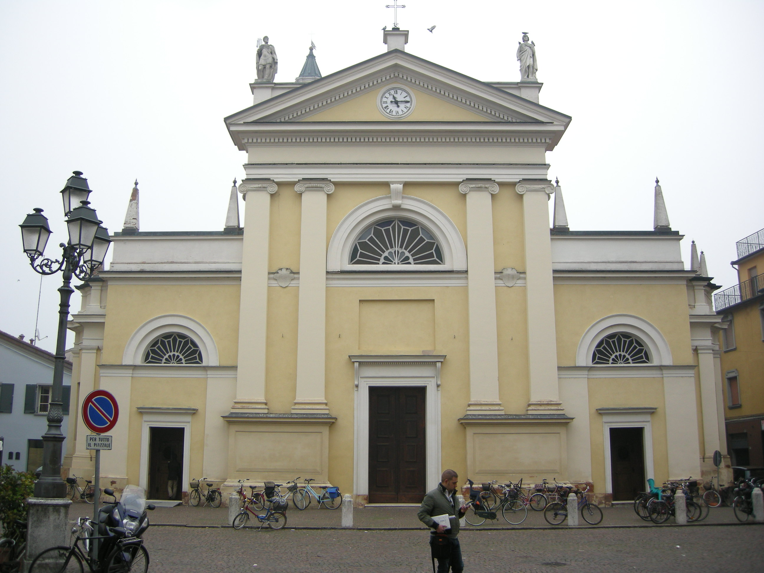 San secondo parmense, duomo